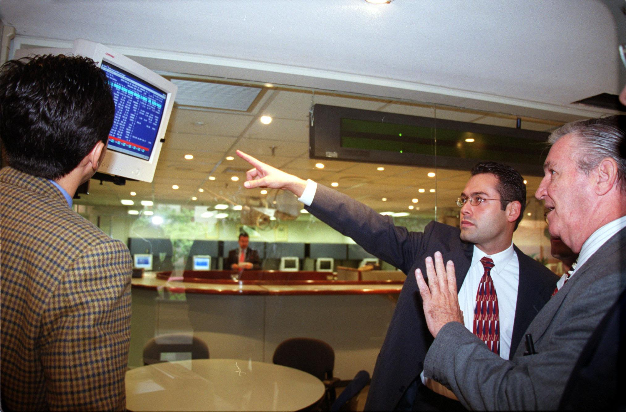 Foto de inversionistas en la sala de observación de la Bolsa de Valores de Caracas.